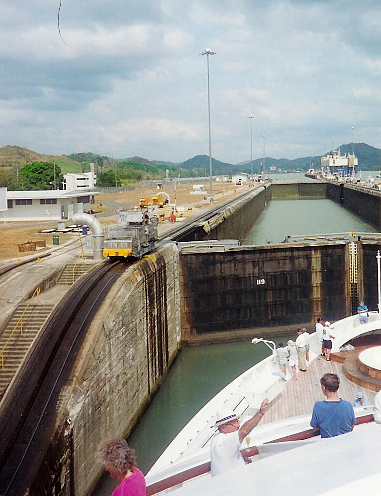 Eng Schleis vum Pananamakanal